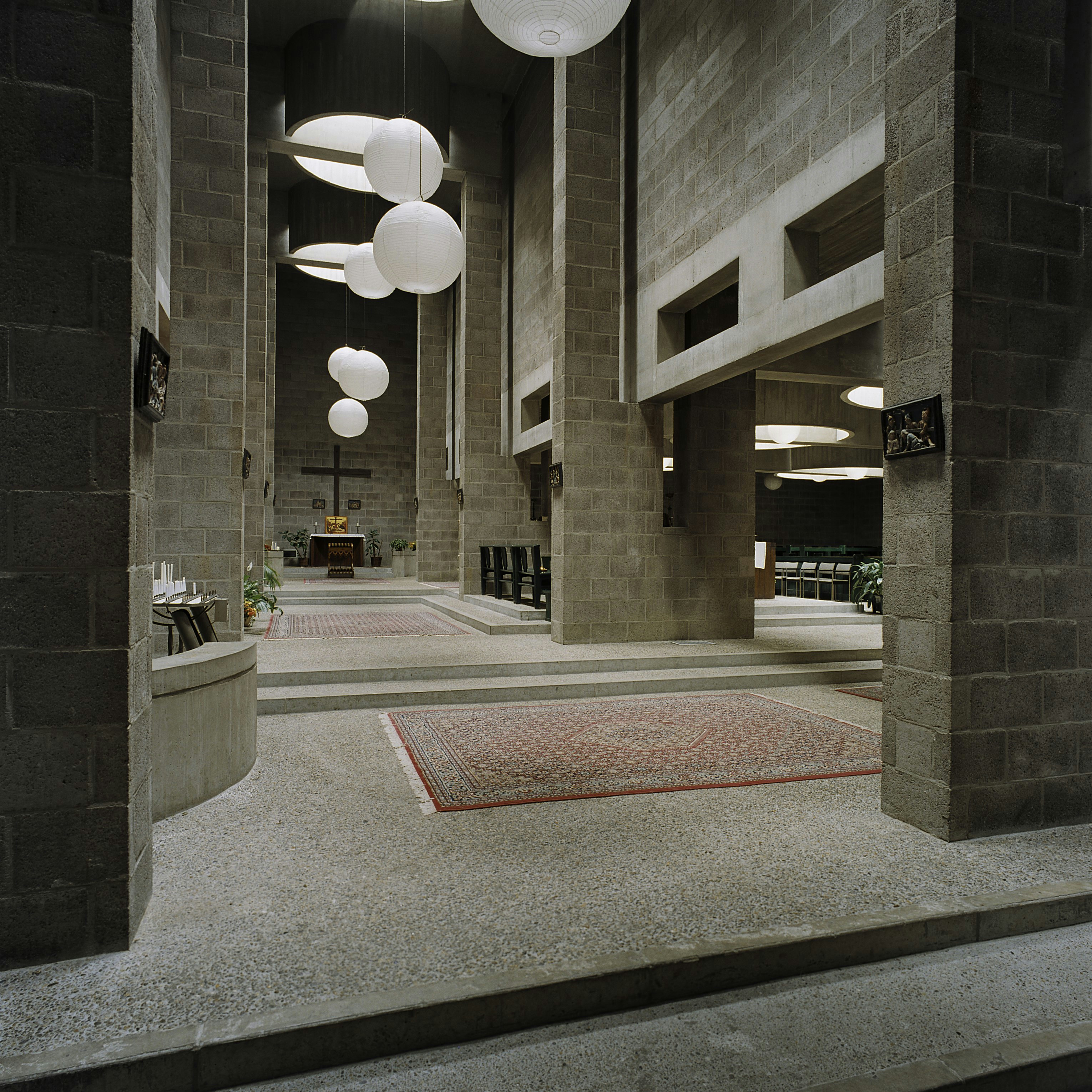 Heilige Pastoor van Arskerk: Interieur, lichtinval door de lichtkoepels (opmerking: Gefotografeerd voor Monumenten In Nederland Zuid-Holland)